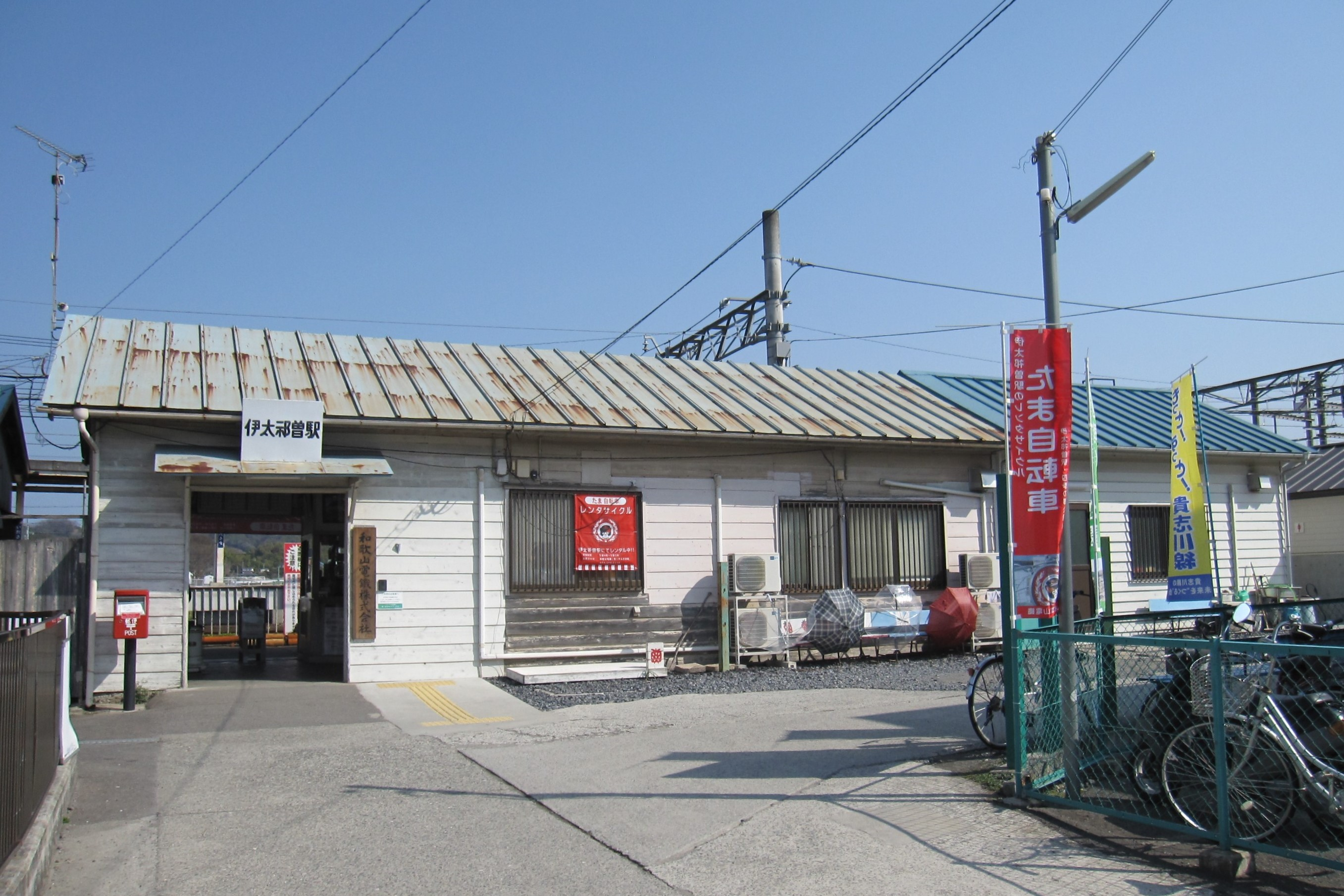 和歌山電鉄伊太祁曽駅